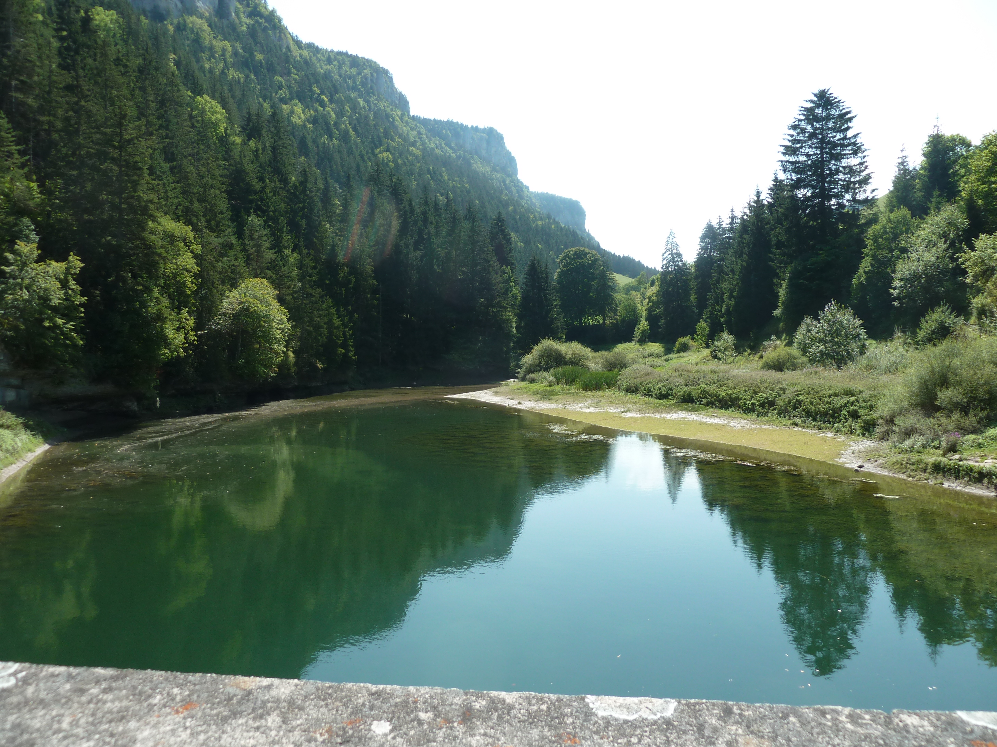 Barrage d'Engins (38) : La retenue d'eau.